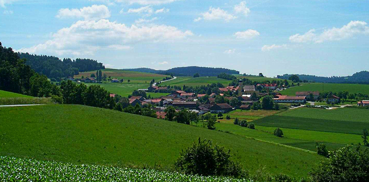 Zenching mit Pfarrkirche St. Ädigius